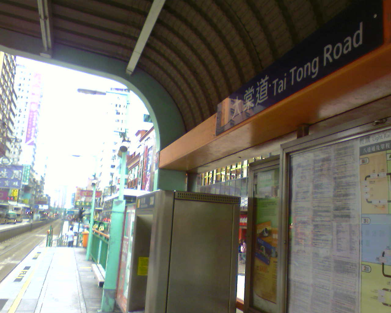 中文（香港）: 輕鐵大棠路站，攝於該站往元朗的月台。